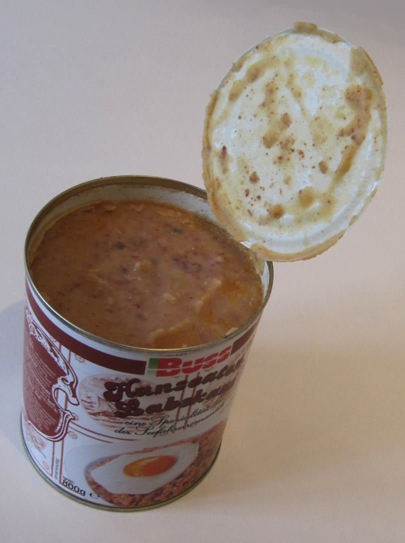 Labskaus_aus_der_Dose_1